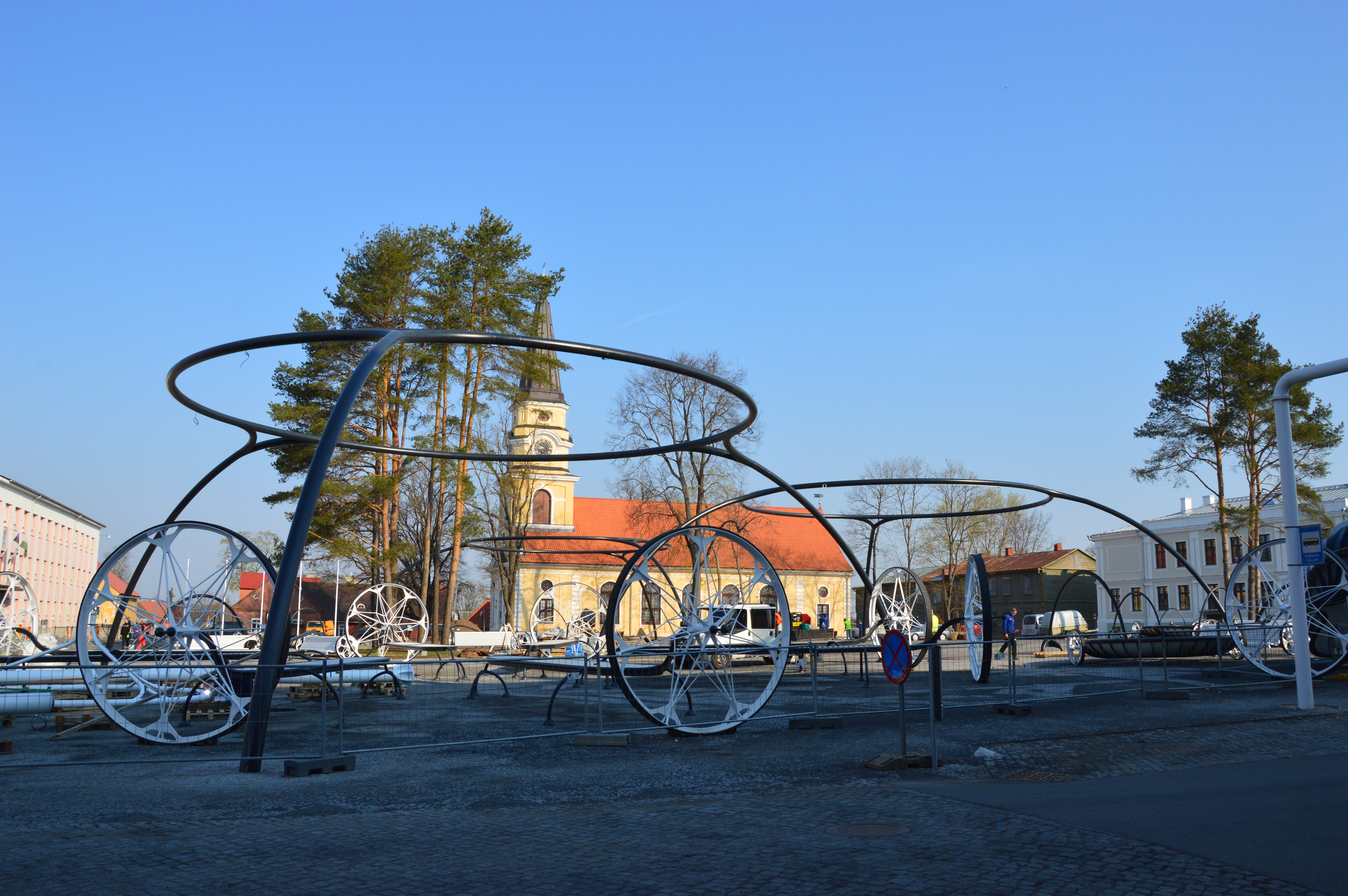 Võru linna keskväljaku ehitamine